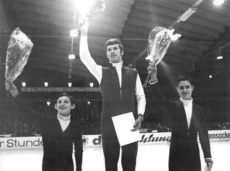 Jahn Hoffmann, Günter Zöller, Wladimir Kowalew Zentralbild Thieme 15.11.69 Karl-Marx-Stadt: Internationales Eiskunstlaufen um den Pokal der blauen Schwerter. Siegerehrung der Herren. vlnr: Jahn Hoffmann (DDR, 3. Pl.), Günter Zöller (DDR, 1. Pl.) und Wladimir Kowalew (UdSSR, 2. Pl.).